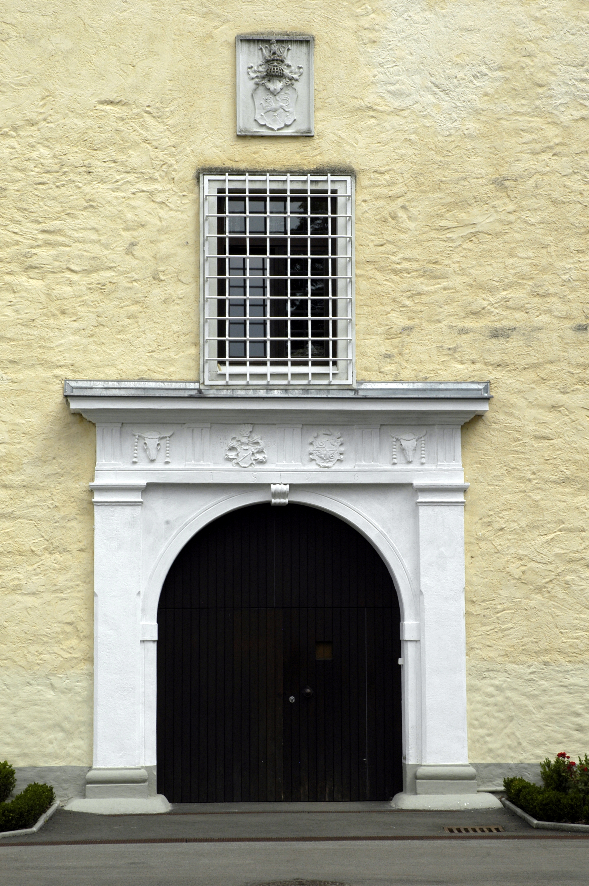 ehemaliges Schloss Sonnberg, Justizanstalt, Westportal